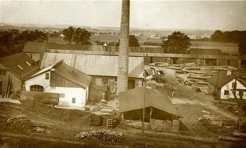 Kagerup Savværk, luftfoto 1940-1950.